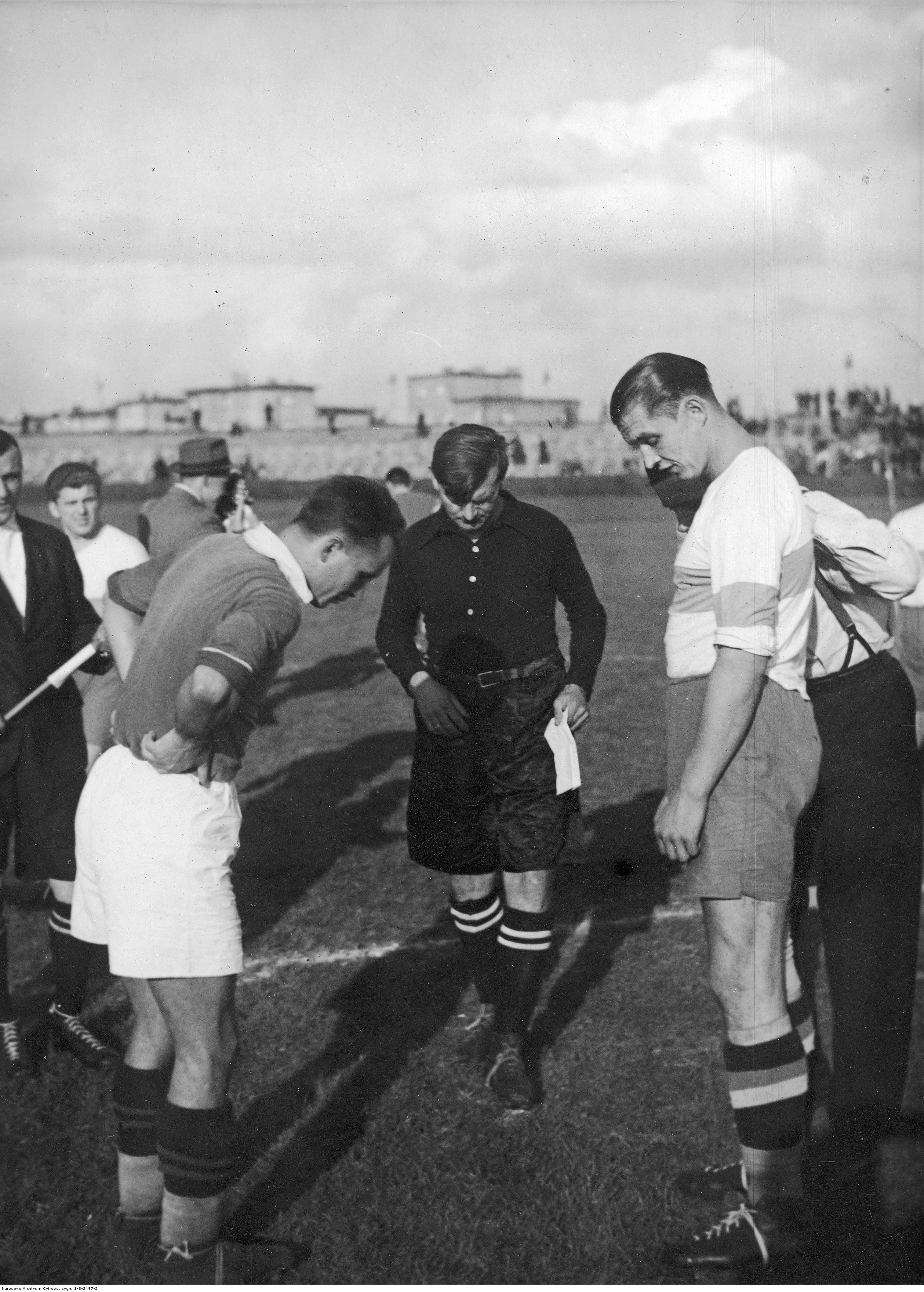 Sędzia Wacław Kuchar oraz Antoni Łyko z TS Wisły Kraków (1. z lewej) i Teodor Peterek z Ruchu Wielkie Hajduki (1. z prawej) w czasie losowania boiska.